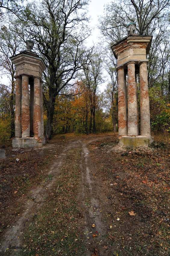 паркова брама палацу Браницьких у Рудому Селі